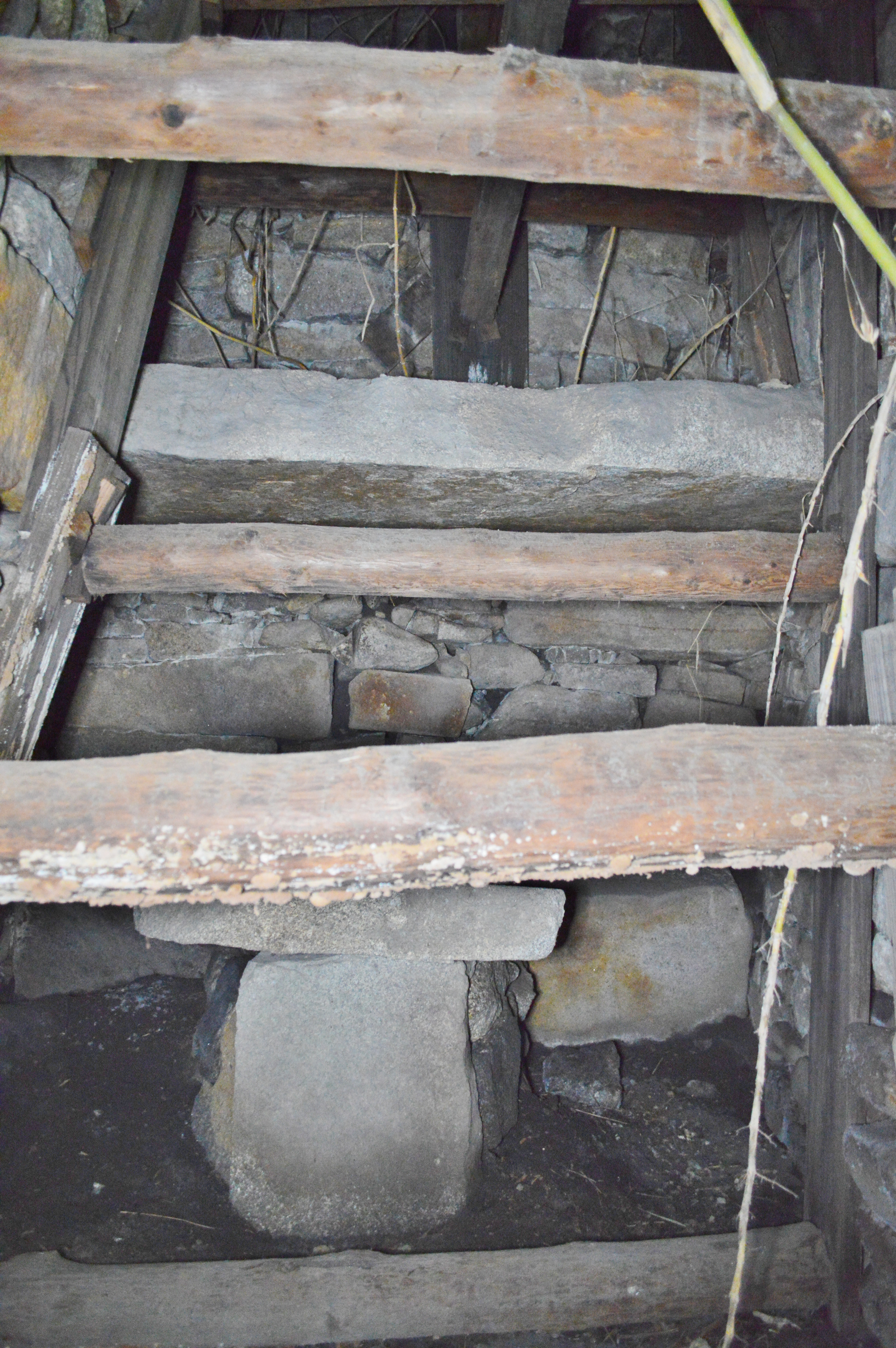 拝田16号墳 石室玄室